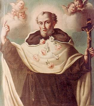 Angelo di Agostino Mazzinghi (1385-1438) ; peinture d'un auteur inconnu